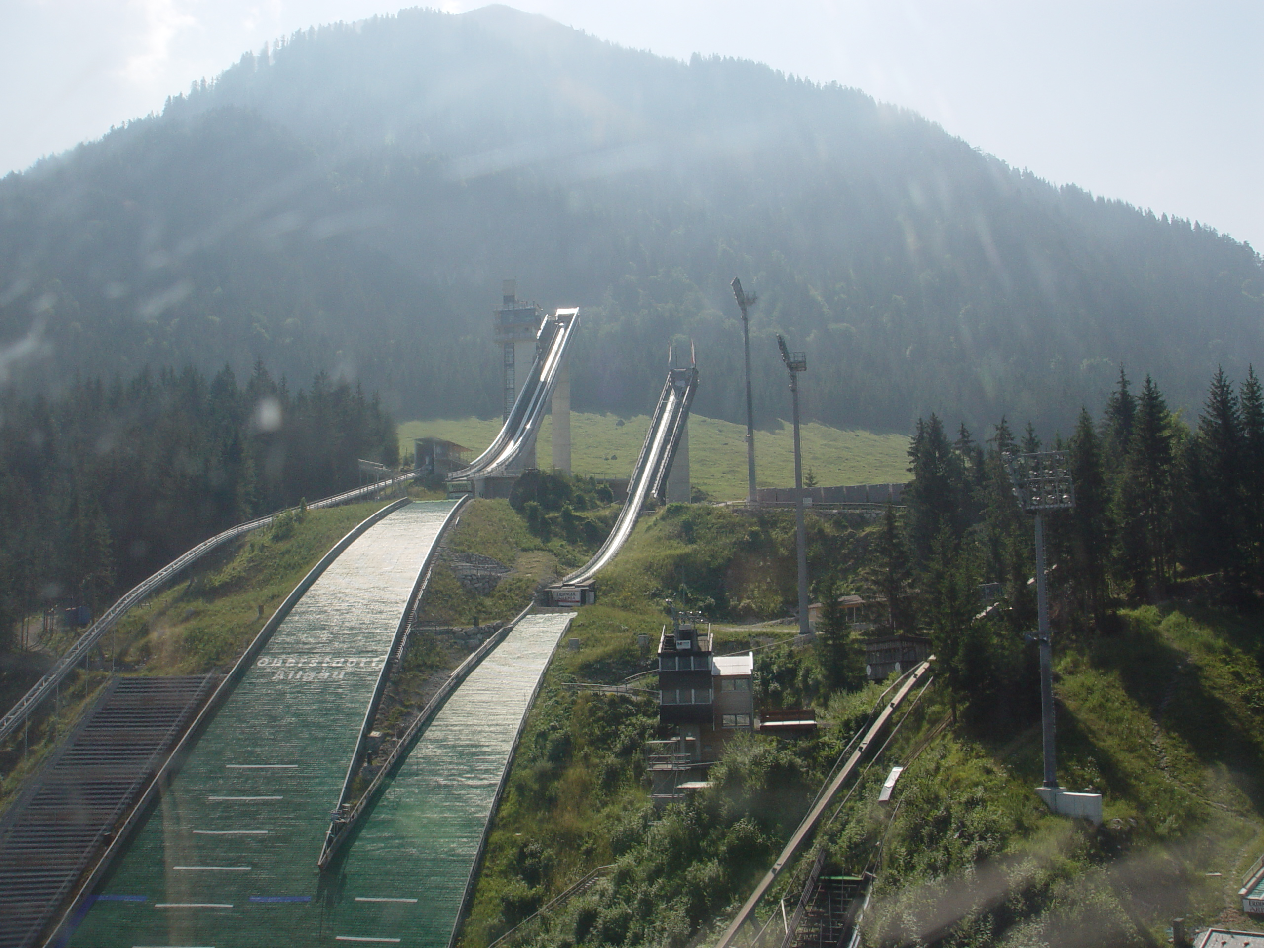 Skisprungschanze von der Nebelhornbahn fotografiert.